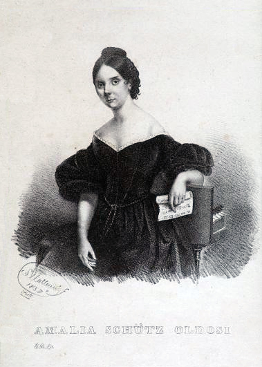 Litografie Amalia Schütz Oldosi (1837)